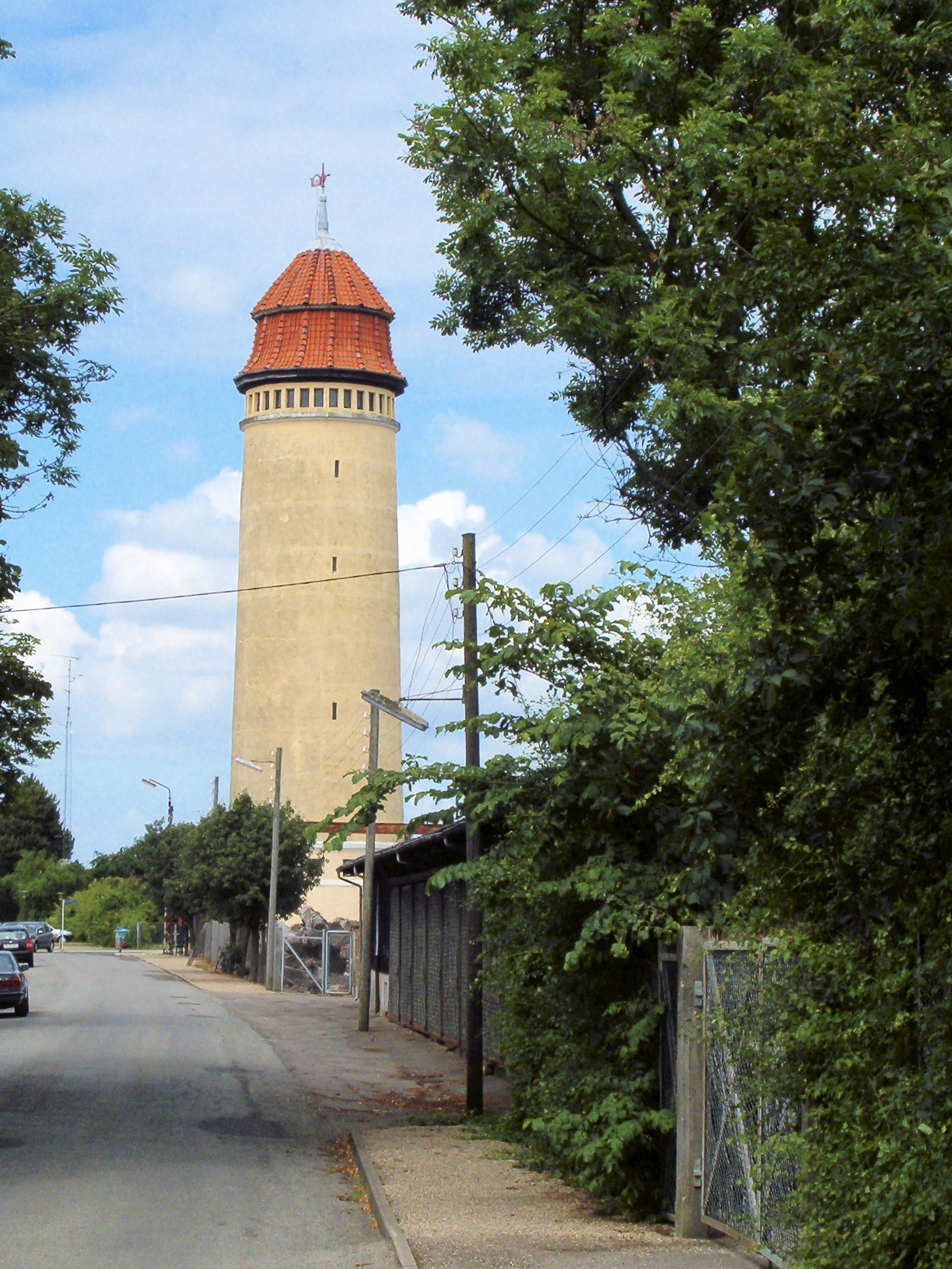 Tidligere vandtårn, nu udsigtstårn i Nysted Former water tower in Nysted (Lolland - Denmark) Made by: Erik Damskier 21:32, 13 July 2006 (UTC)